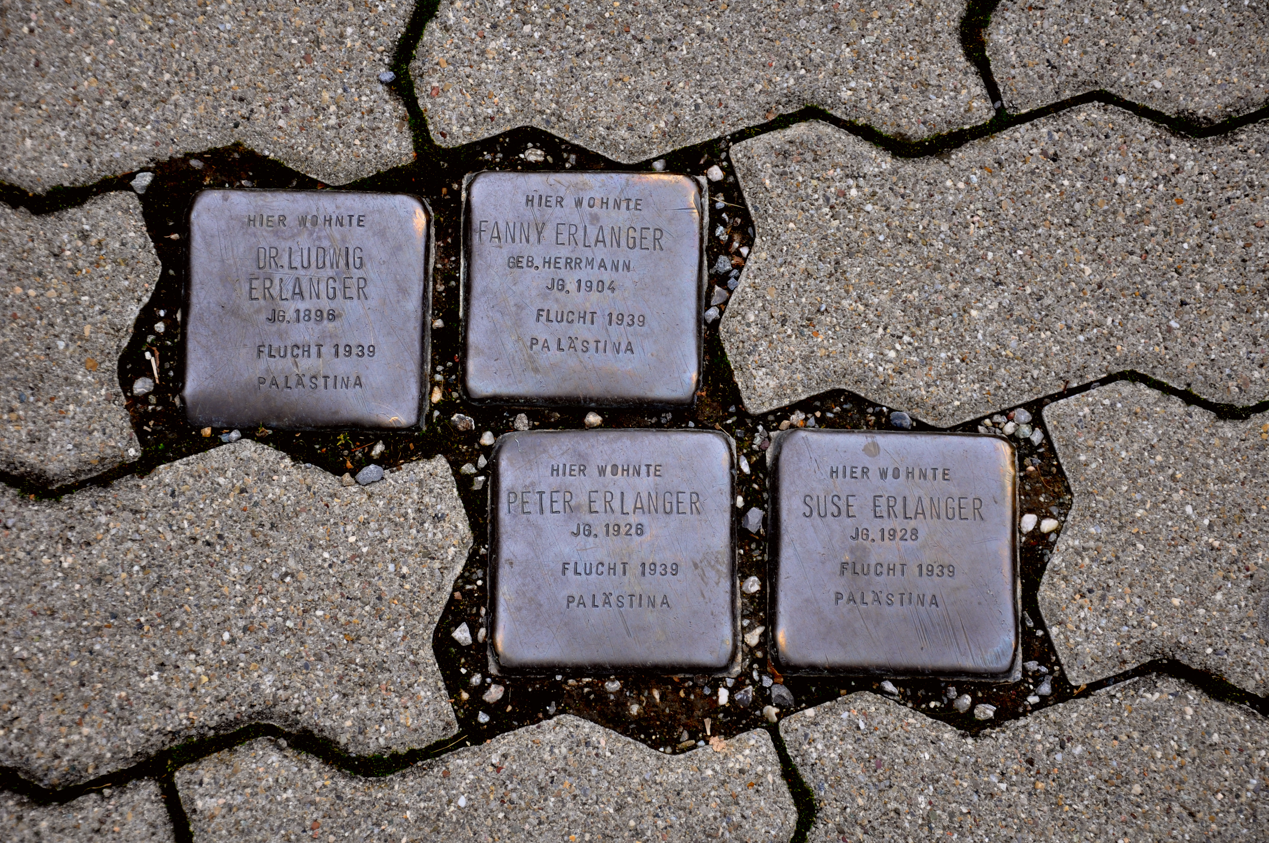 Ravensburg, Bildungszentrum St. Konrad, „Stolpersteine“ zur Erinnerung an vier im Nationalsozialismus vertriebene Mitglieder der jüdischen Familie Erlanger, die an dieser Stelle ein landwirtschaftliches Mustergut betrieb (siehe Pinchas Erlanger)